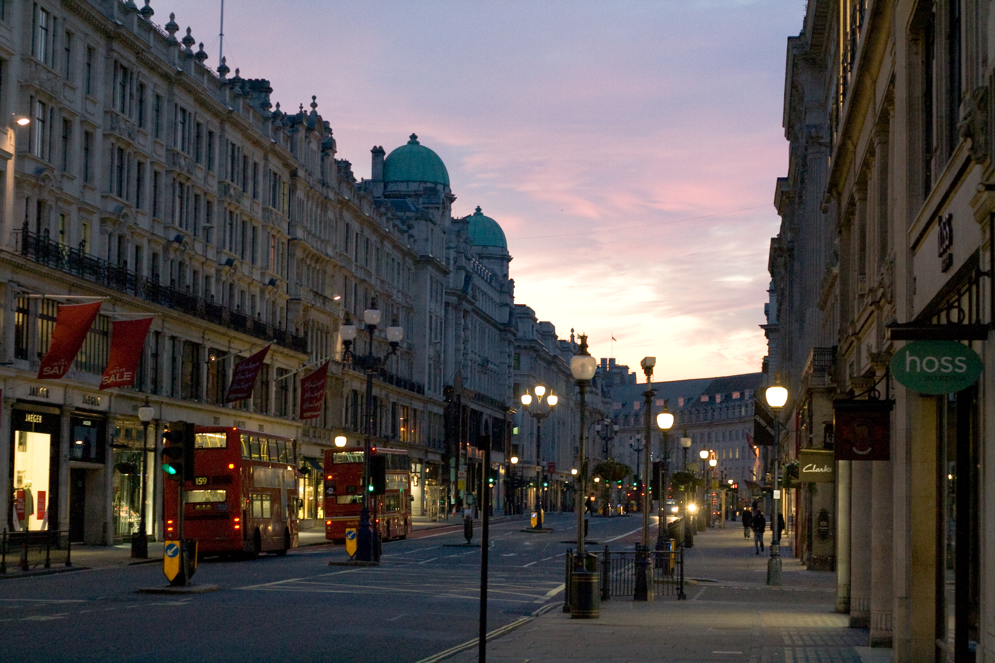 Pink sunrise at Regent Street, London